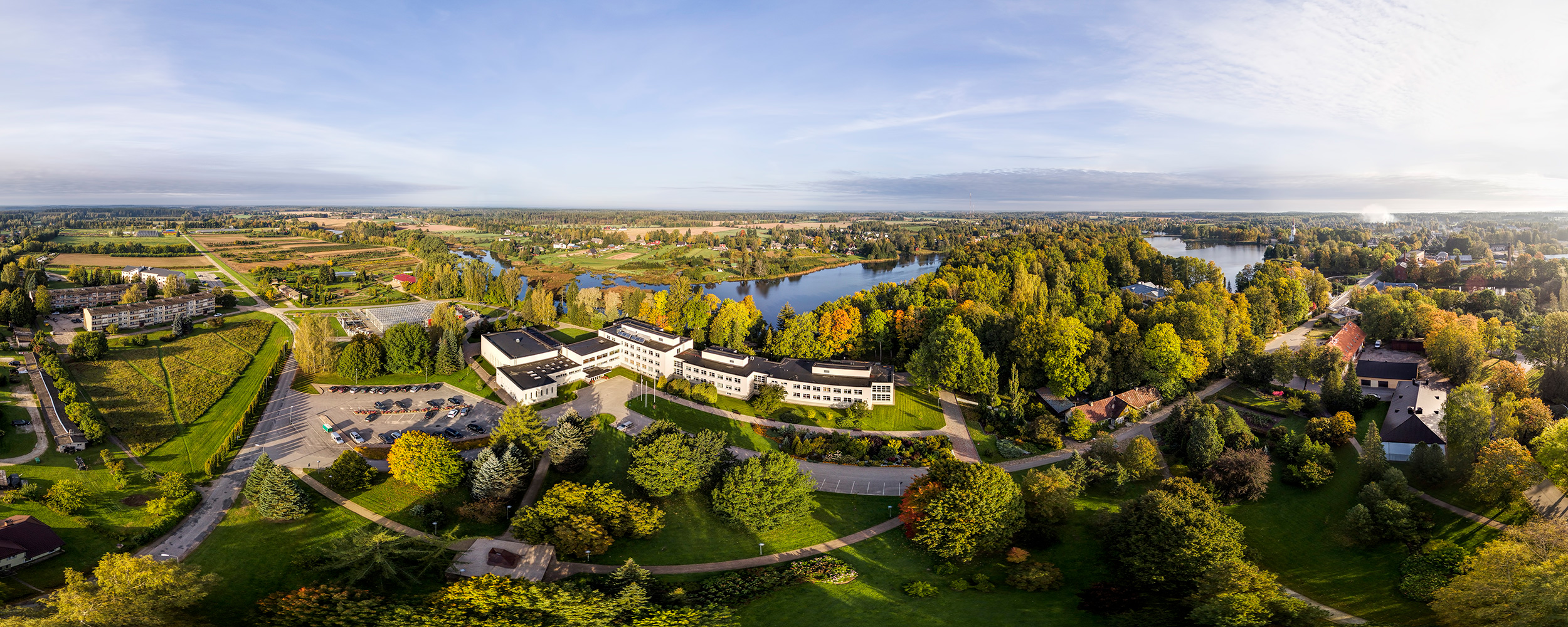 Aerofoto Räpina Aianduskoolist